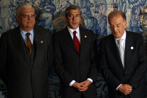 O Ministro de Estado e Assuntos Exteriores de Portugal, Diogo Freitas do Amaral, o primeiro-ministro, José Sócrates Carvalho Pinto de Sousa, e o Presidente da República Portuguesa, Jorge Fernando Branco de Sampaio